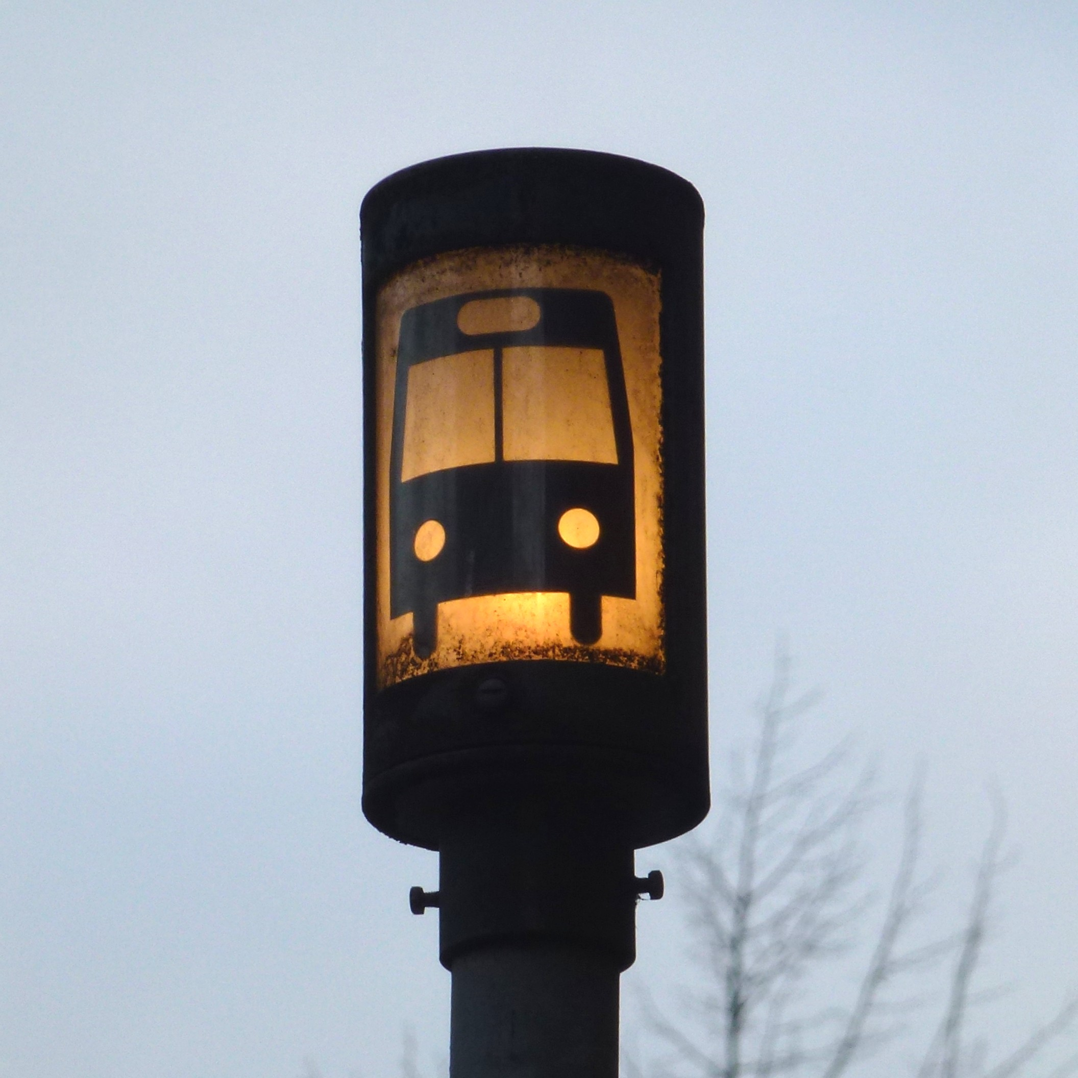 Pribuss symbol tänd